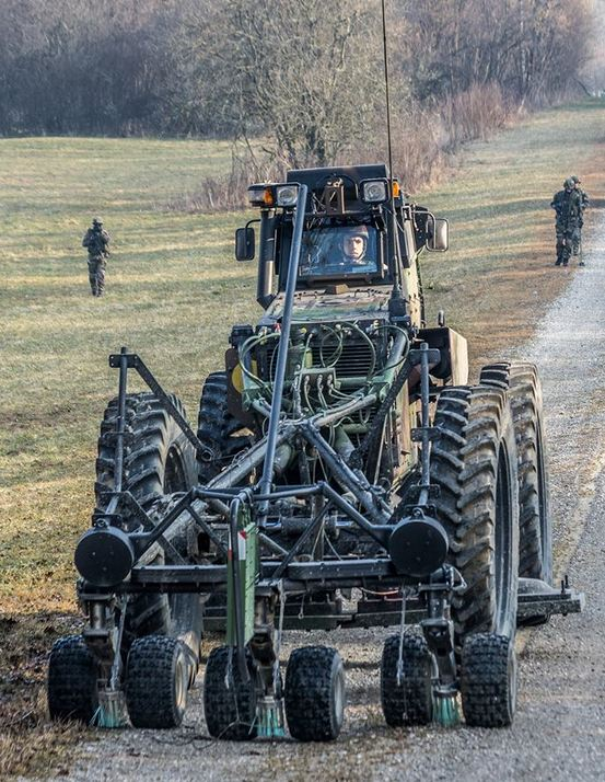 Système d'ouverture d'itinéraire miné, capable de détecter les engins explosifs enterrés